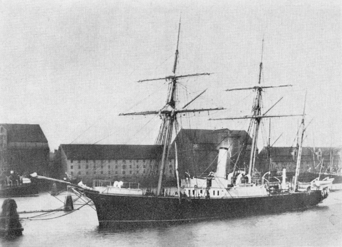 Danish Naval Schooner Fylla in Copenhagen, Denmark, 1888